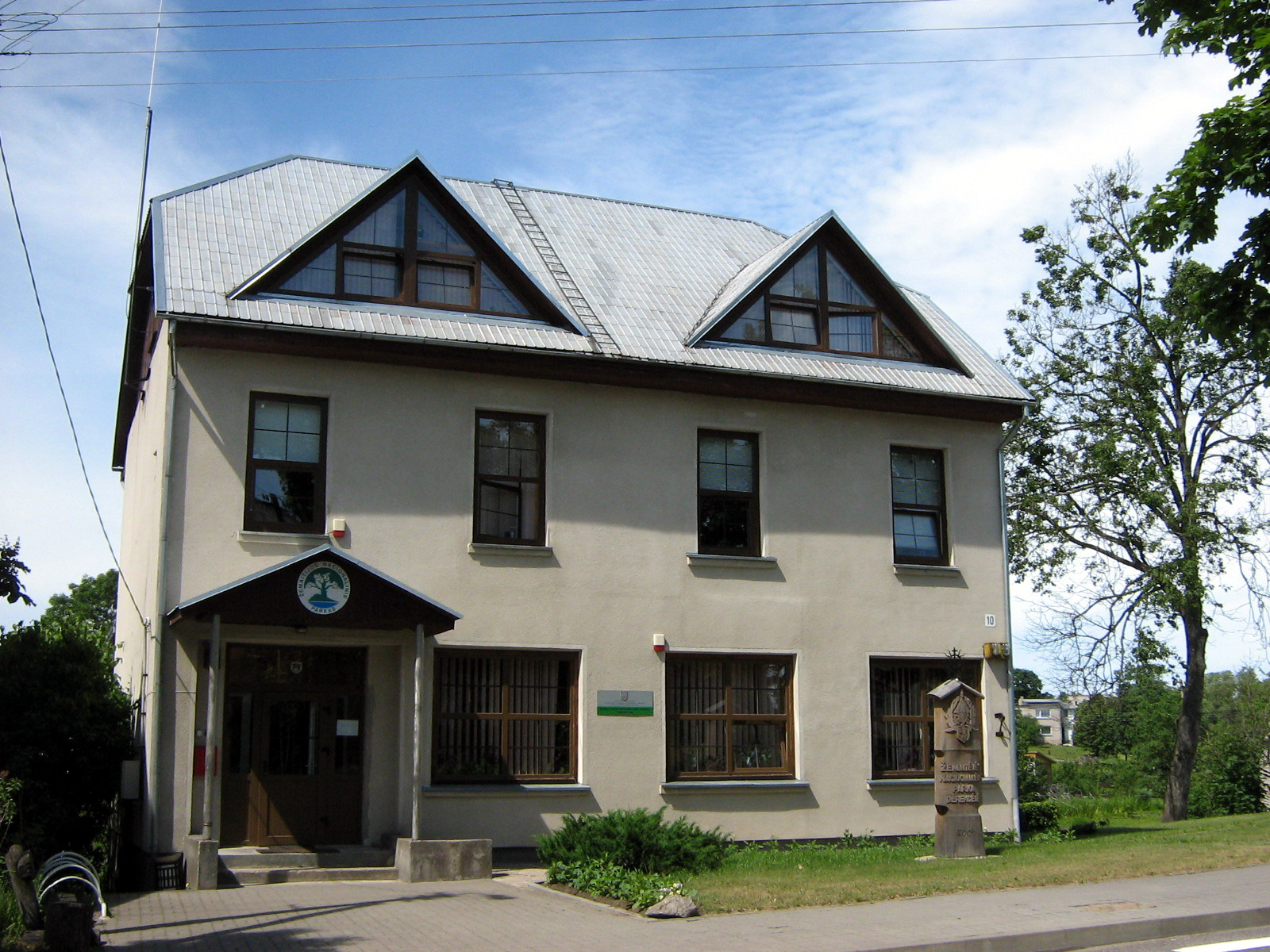 Žemaitijos nacionalinis parkas, direkcija Foto: Algirdas, 2007-06-15